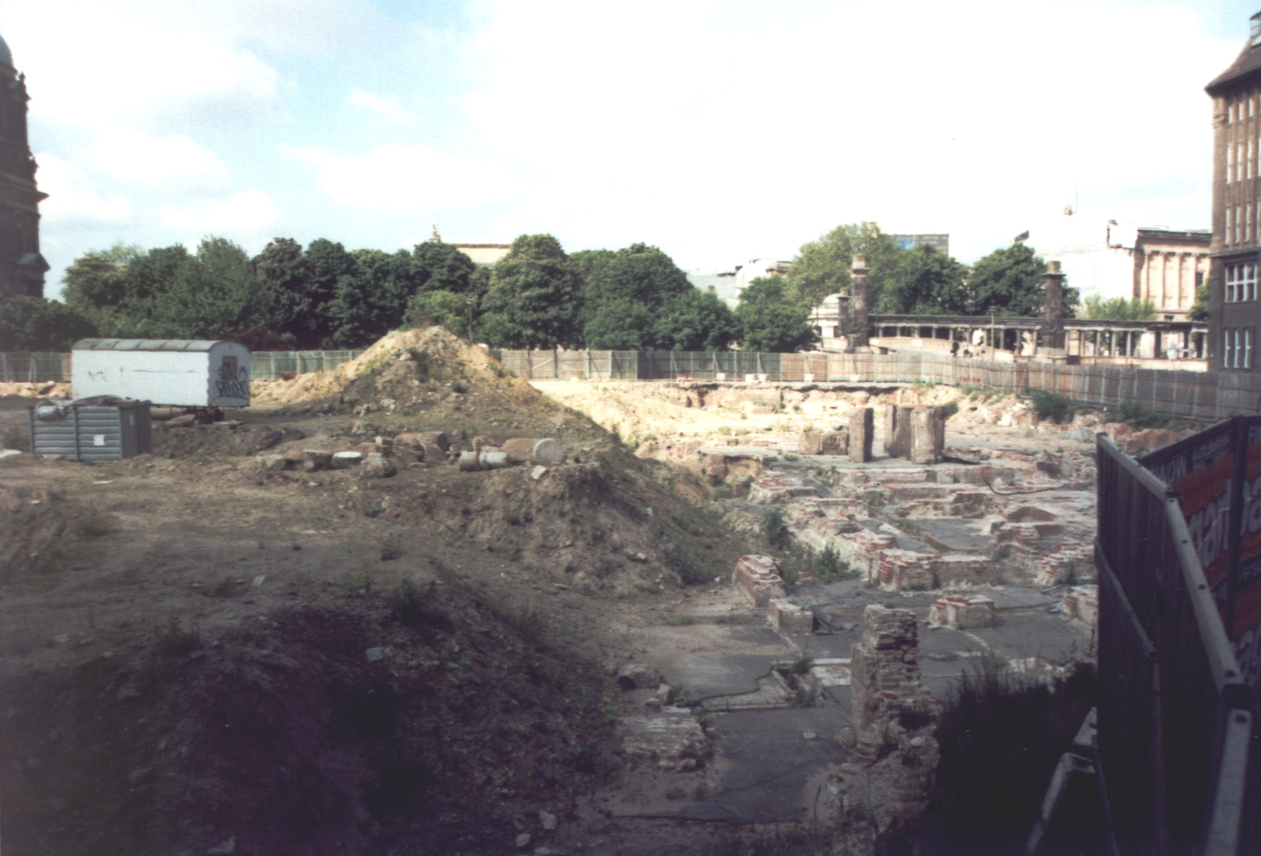 Die Reste der Berliner Börse 1998 an der Burgstraße